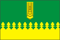 Oisu valla lipp